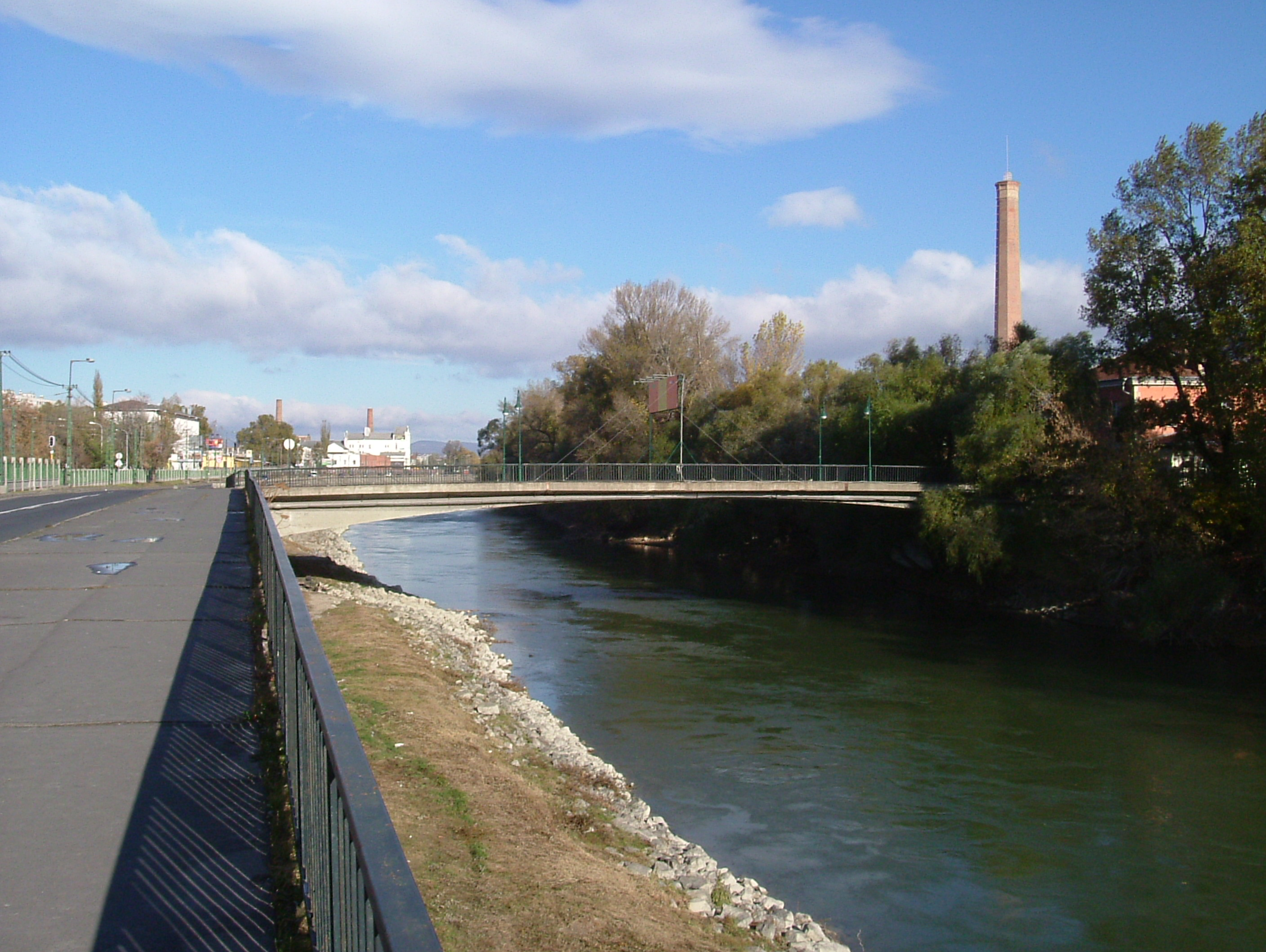 Híd a Hajógyári szigetre az egykori hajógyárhoz